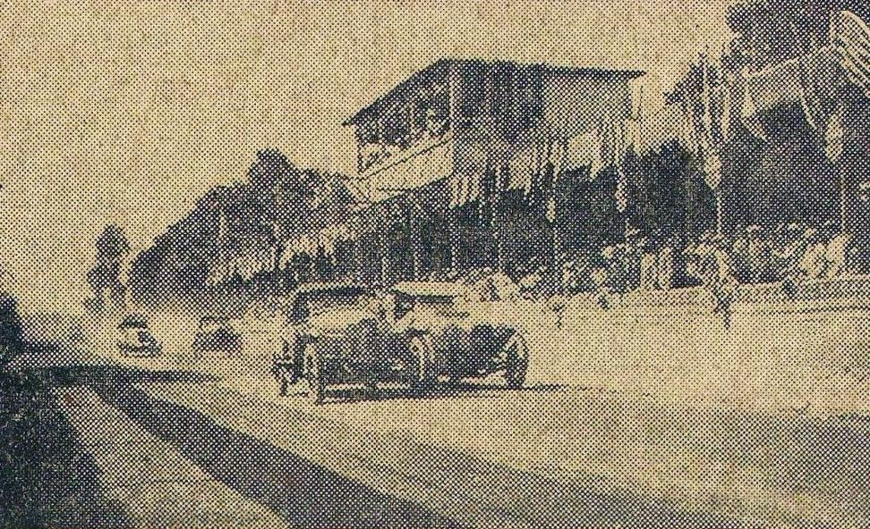 Le départ des 24 Heures du Mans 1925.